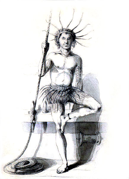 Costume, Ellice's Group